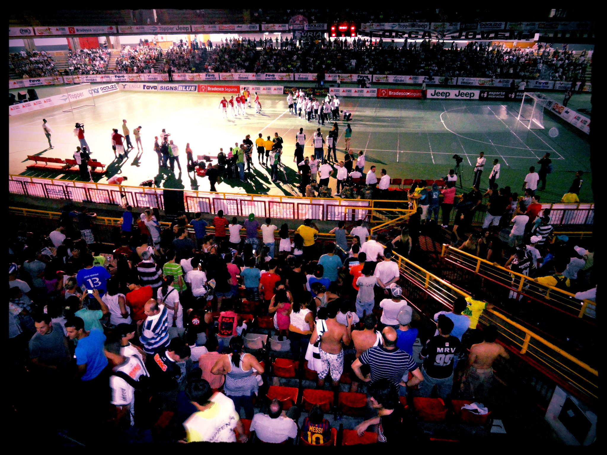 Estádio Jornalista Felipe Drummond em 2012.